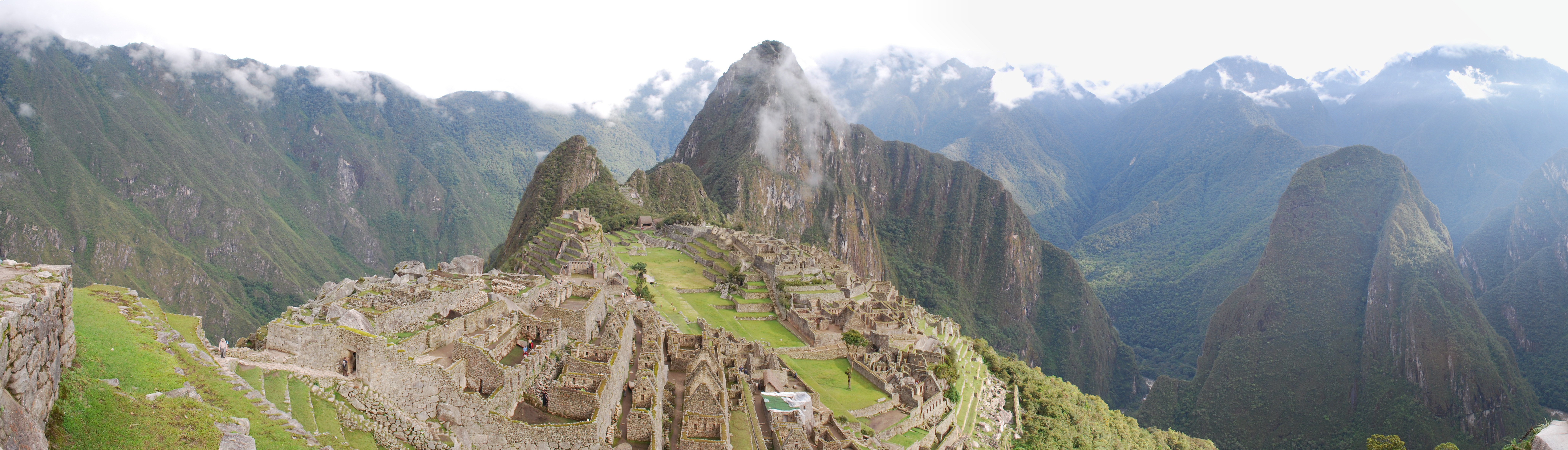 Panorama Machu picchu.